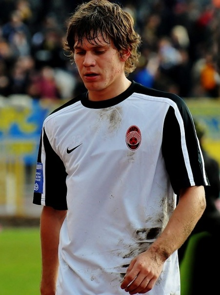 Максим Иванович Белый — украинский футболист.